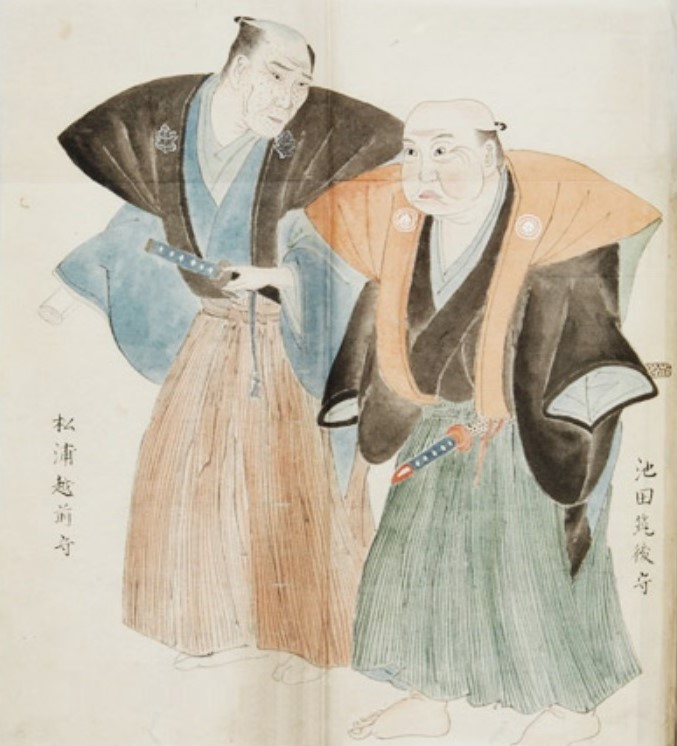 大目付池田長恵(右)と松浦信桯(左)の肖像。